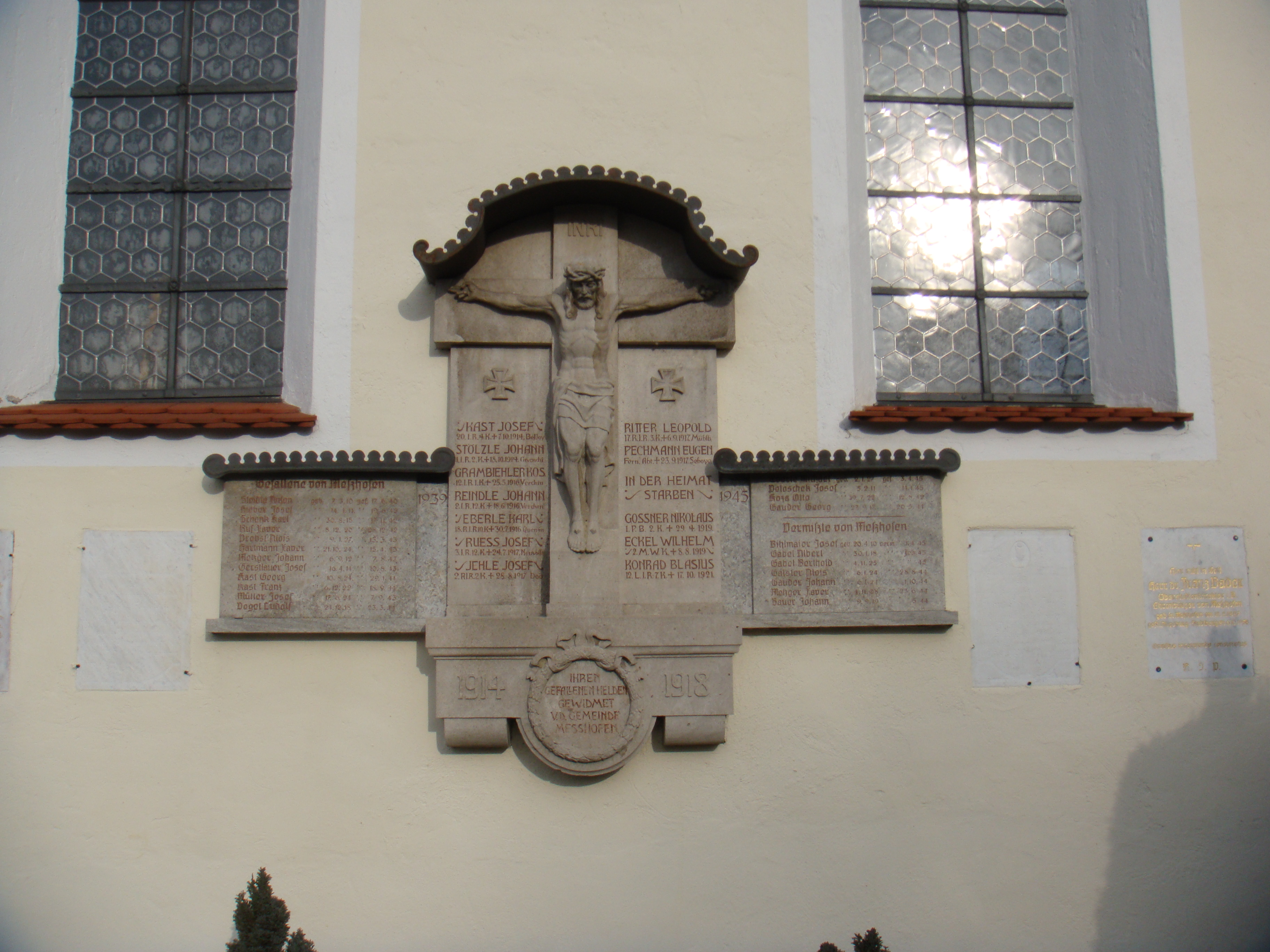 Kriegerdenkmal Meßhofen 1914-1918